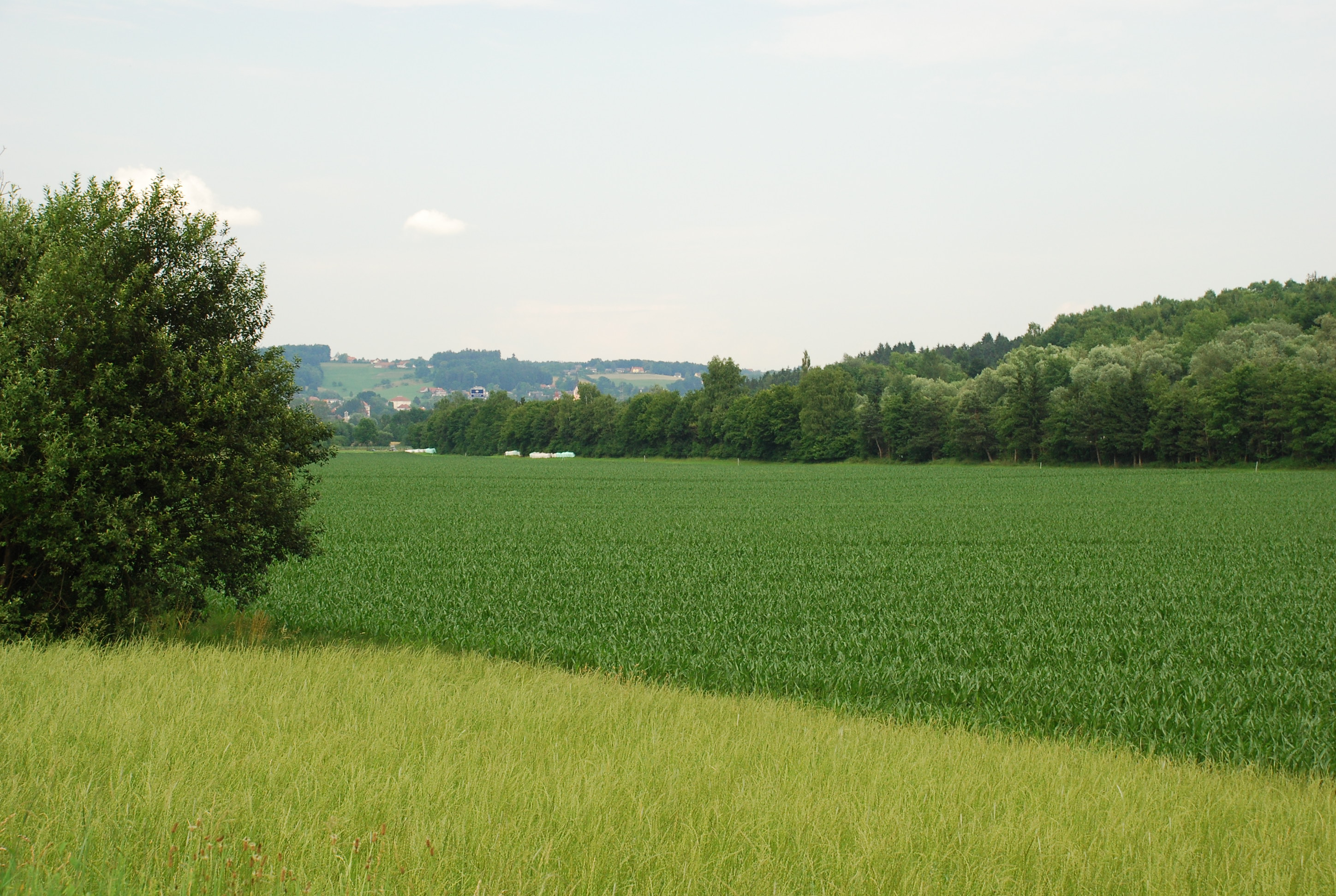 Talboden der Laßnitz vor Gleisdorf, Oststeiermark